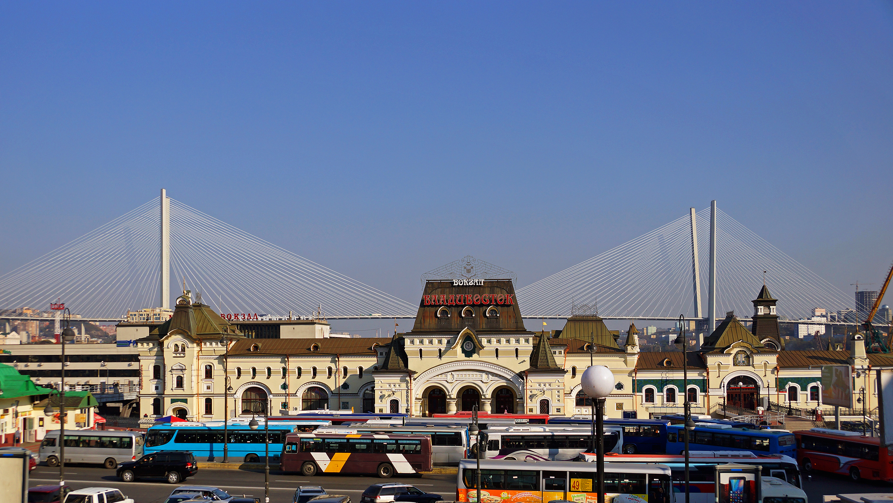 Здание железнодорожного вокзала, связанное с революционными событиями 1905-1906 гг. и борьбой в годы Гражданской войны и интервенции 1917-1922 гг.: улица Алеутская, 2 (площадь Вокзальная), Владивосток, Приморский край